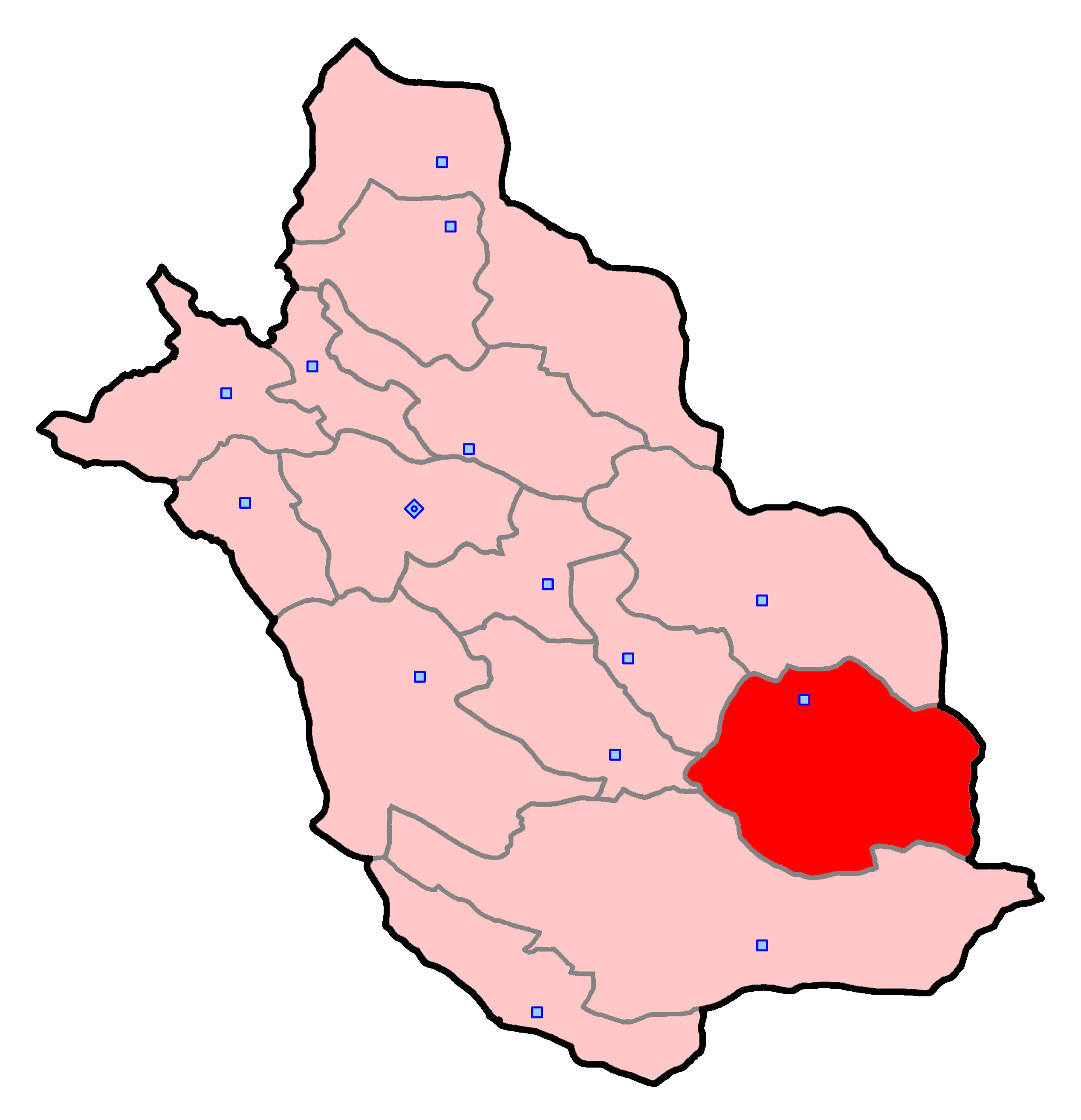 حوزهٔ انتخاباتی داراب و زرین‌دشت برای انتخابات مجلس شورای اسلامی